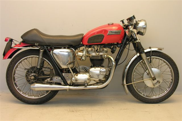 Triumph 650 Bonneville motorcycle 1965